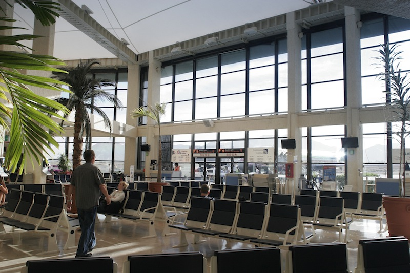 Aeropuerto de Los Cabos